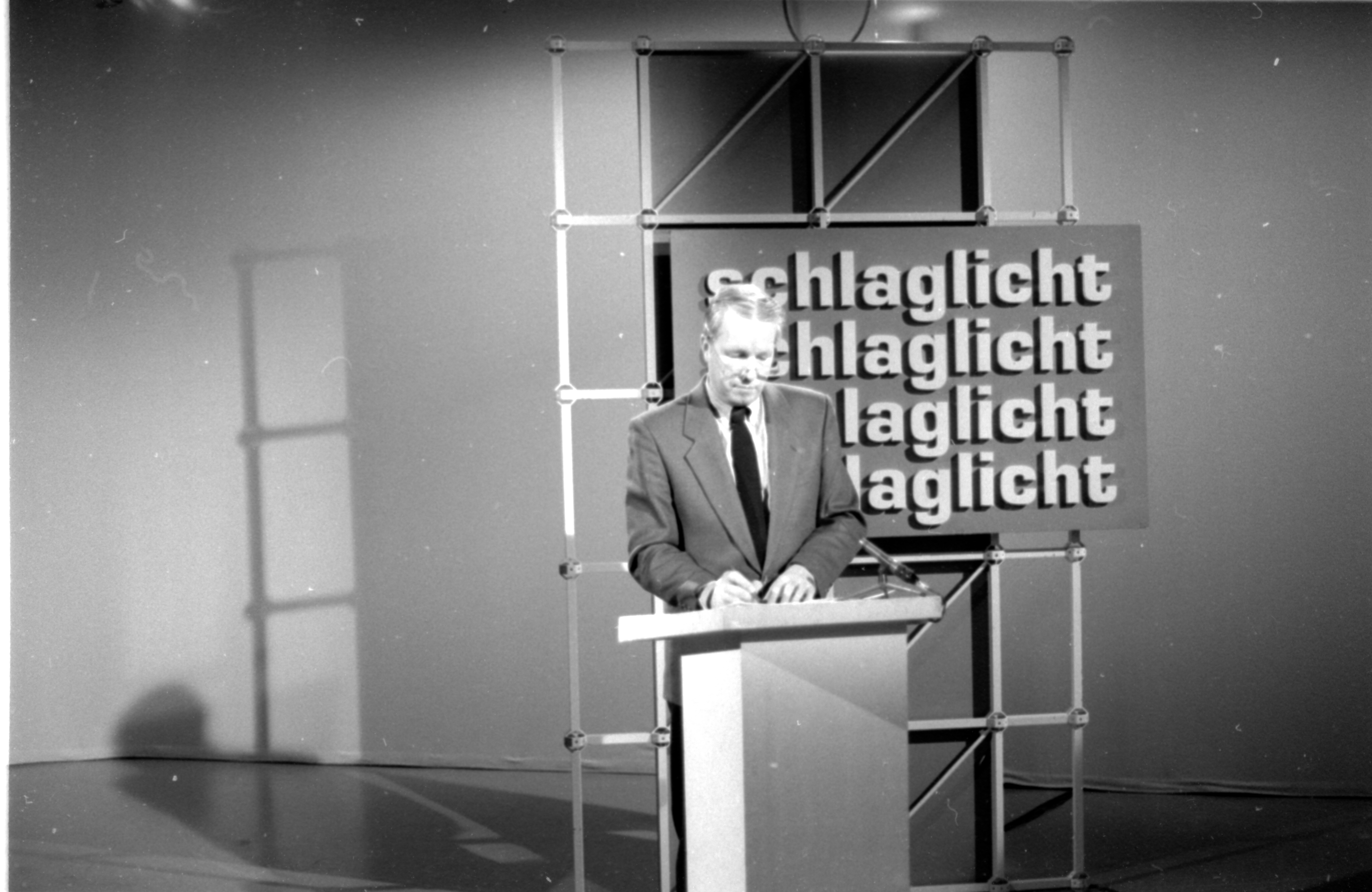 Sendung des SWF zu den politischen Stiftungen mit Holger Börner und Bernhard Vogel